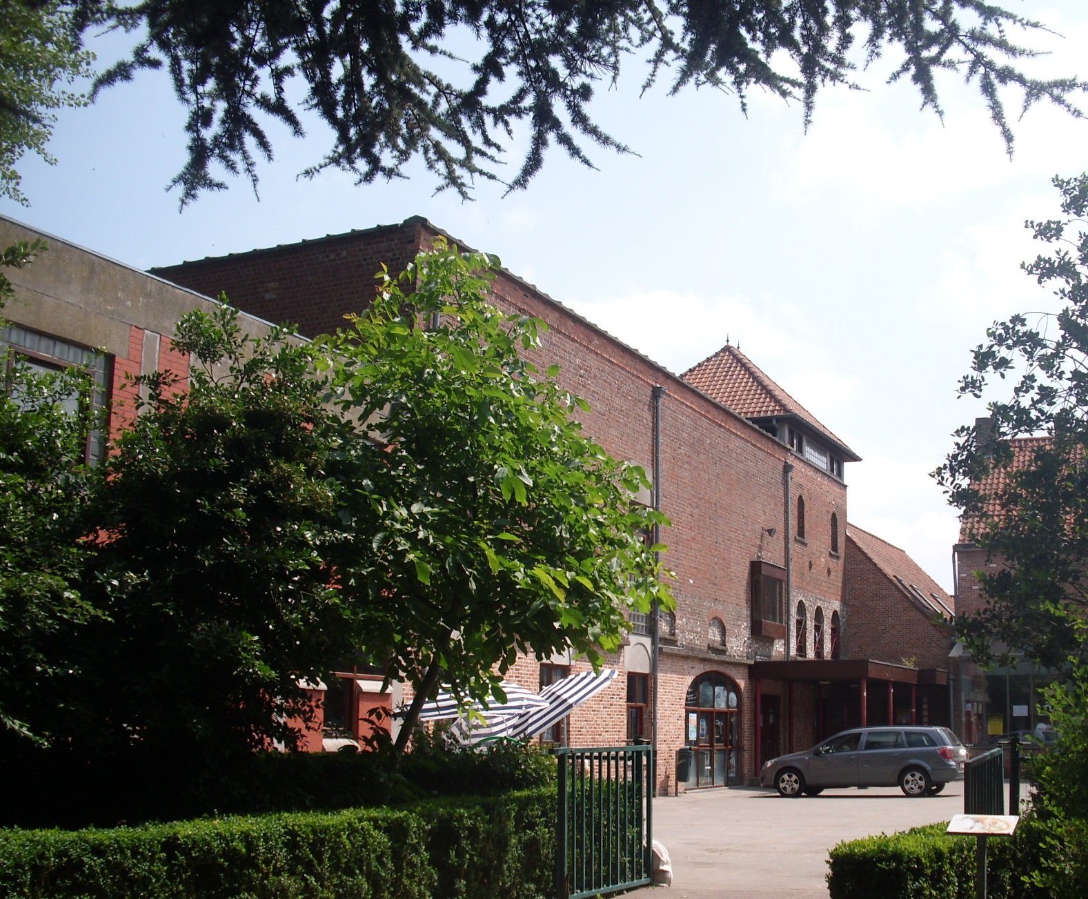 De voormalige Mouterij - Brouwerij De Geest - Ieperstraat - Moorsele - Wevelgem - West-Vlaanderen - België